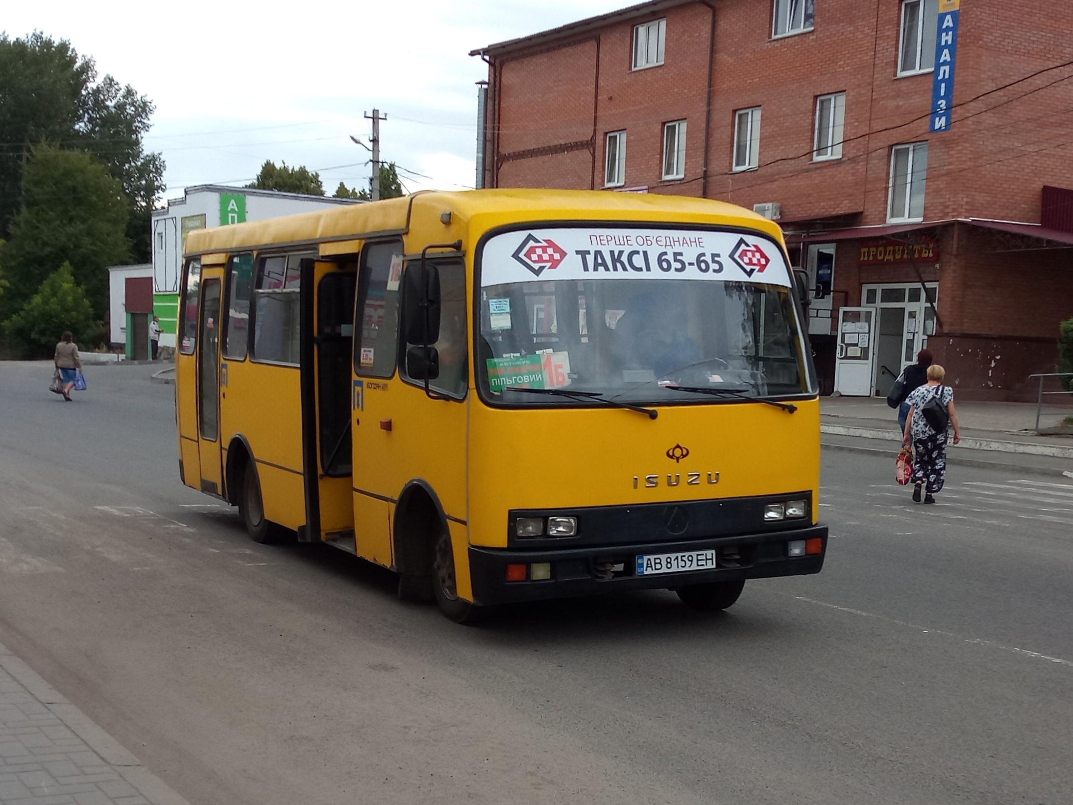 Богдан А091 маршруту №1б на вулиці Київській, що у Жмеринці, Вінницька область